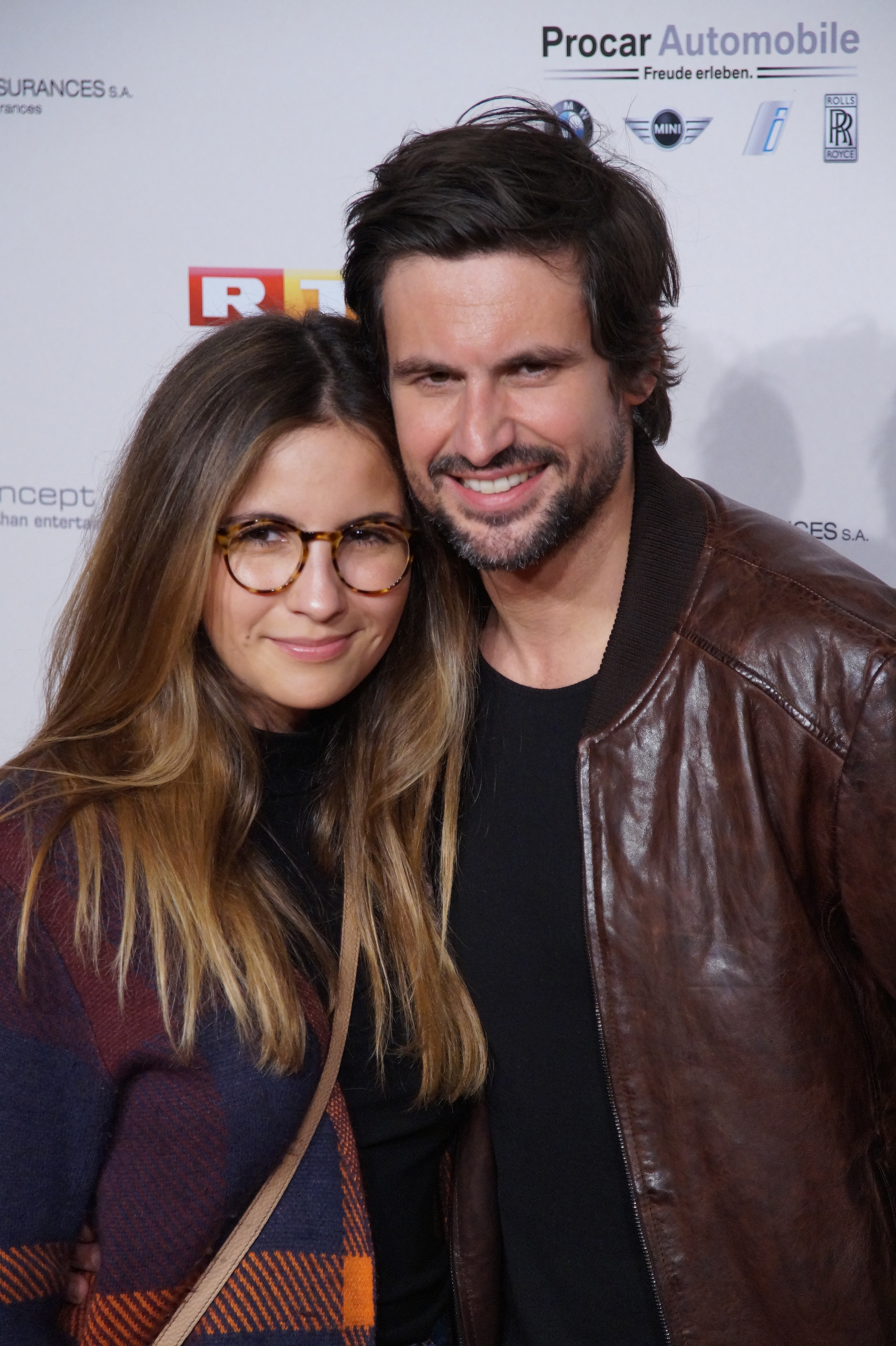 Chryssanthi Kavazi & Tom Beck bei der Premiere von der 300. Folge 'Alarm für Cobra 11', April 2016.